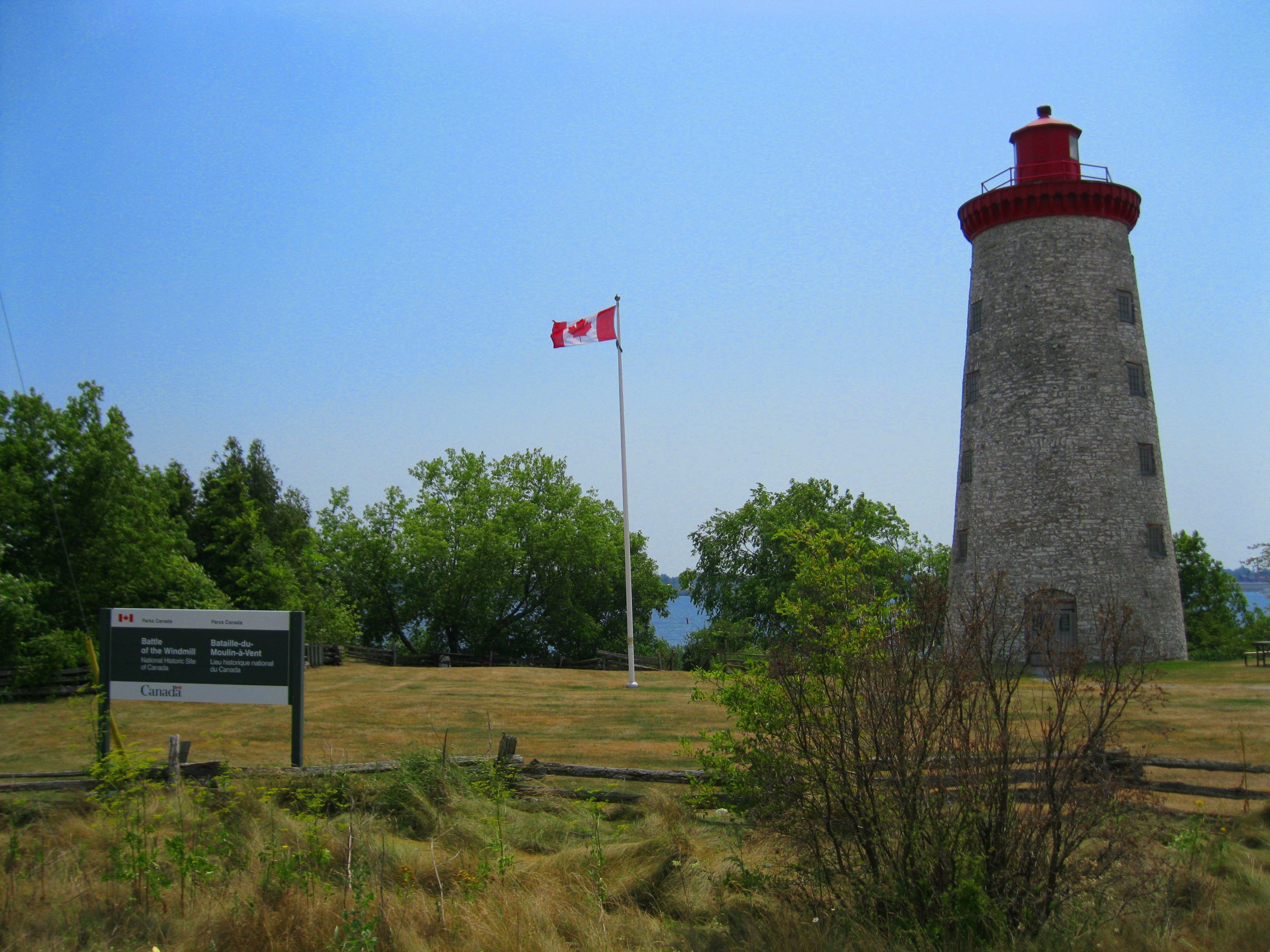 C'est une photo du lieu où s'est déroulée la Bataille-du-Moulin-à-Vent. C'est bataille, qui s'est produite en novembre 1838, opposait les forces loyalistes du Haut-Canada aux "Frères Chasseurs".